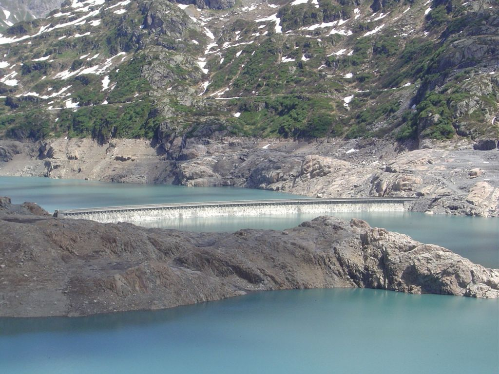 Der Lac d'Emosson, das Ausflugsziel am oberen Ende des "Parc d'Attractions du Châtelard". Der Stausee ist am 22.06.2008 jahreszeitengemäss noch nicht ganz gefüllt, sodass die Krone der alten Staumauer "Barberine" noch über dem Wasserspiegel sichtbar ist. Bild: Thomas Brändle, Schweiz